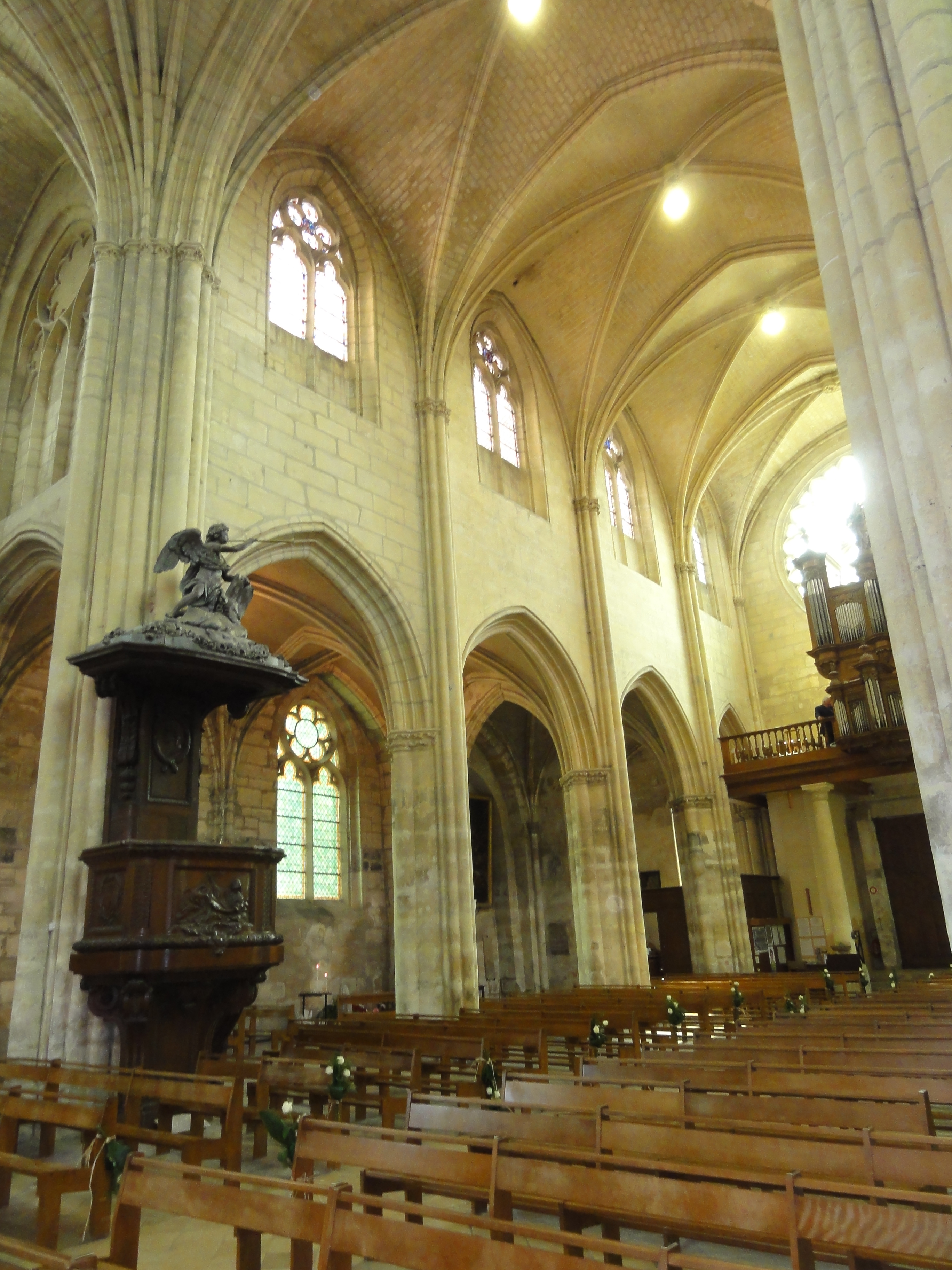 intérieur de l'Église Notre-Dame de Chambly